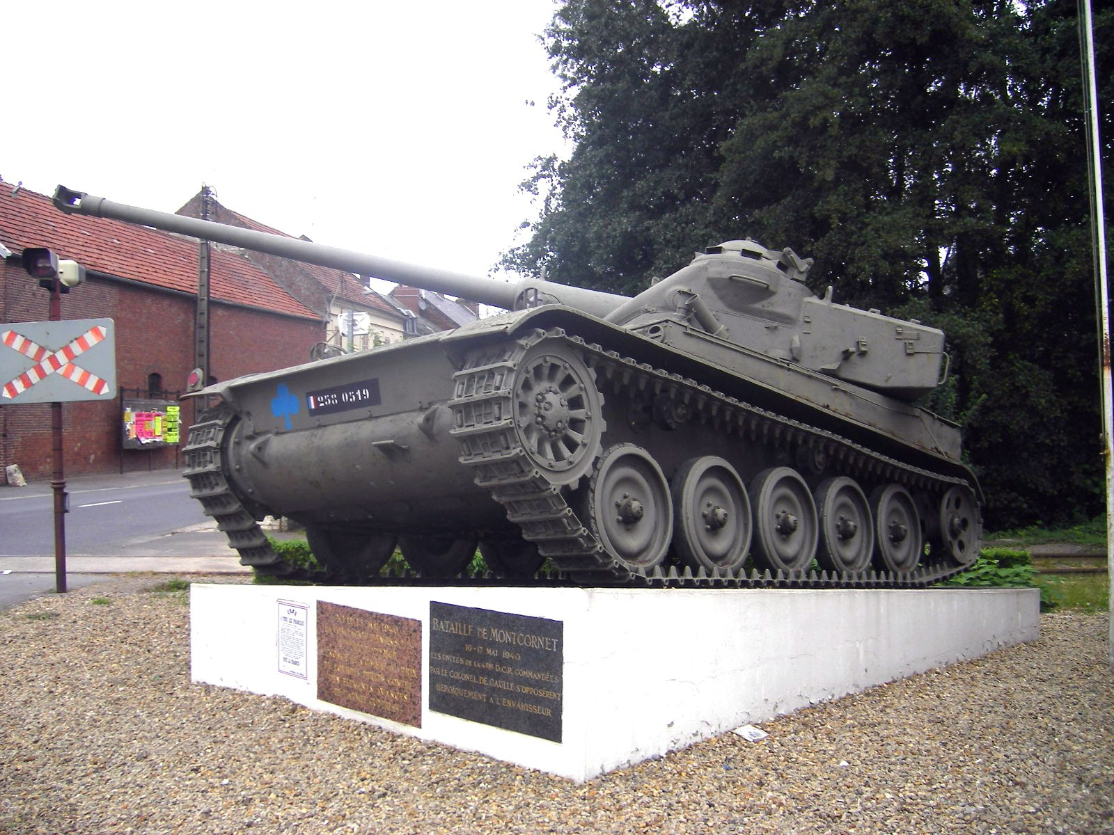 Un char AMX-13 sur le mémorial de la bataille de Montcornet de 1940; Ce char construit à partir des années 1950 n'a pas participé à la seconde guerre mondiale.